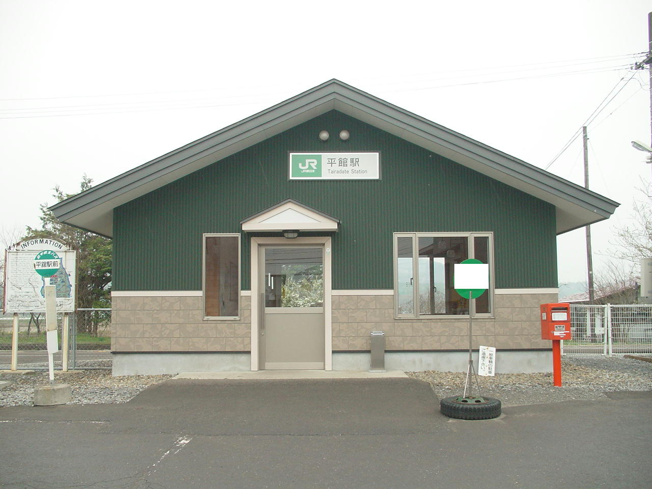 （平舘駅）